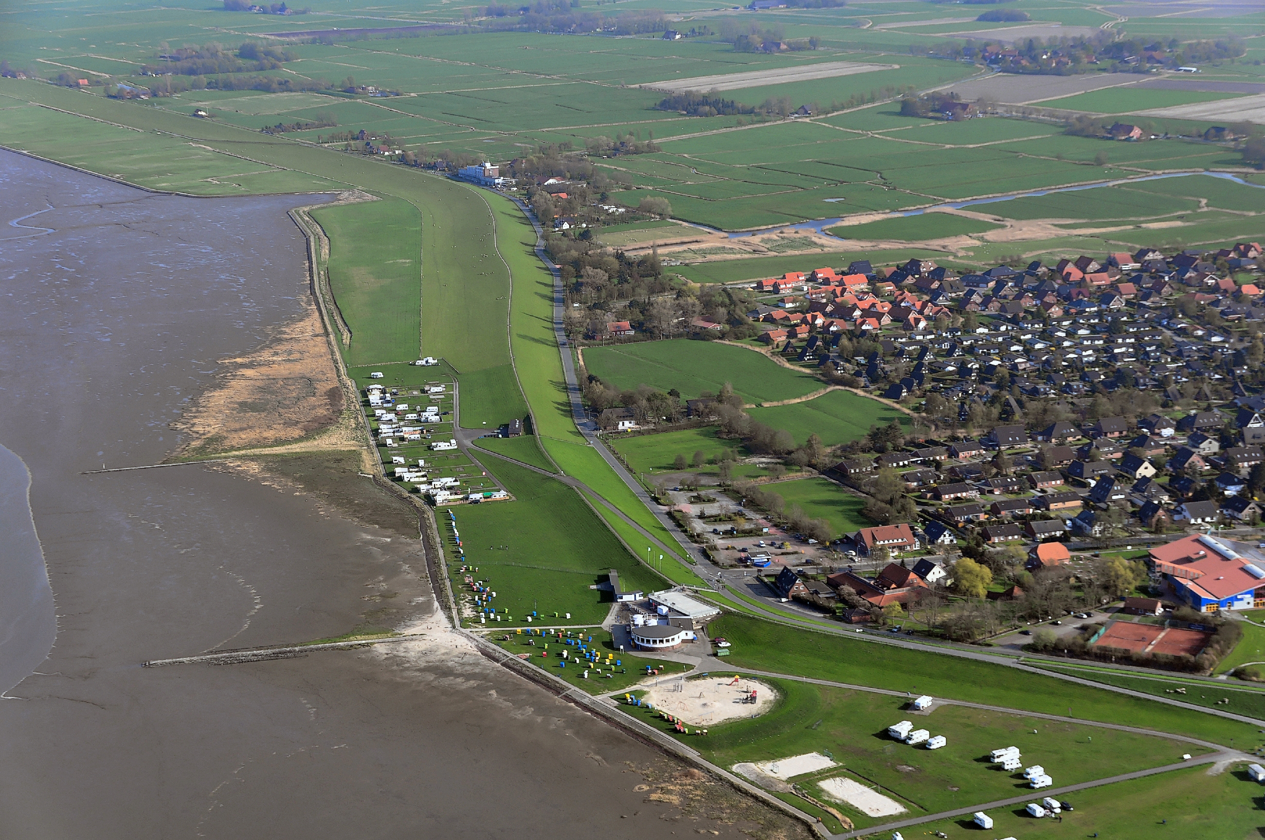 Luftbilder von der Nordseeküste 2013-05